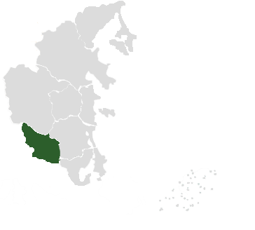 Bản đồ tỉnh Khánh Hòa với vị trí huyện Khánh Sơn được tô đậm.